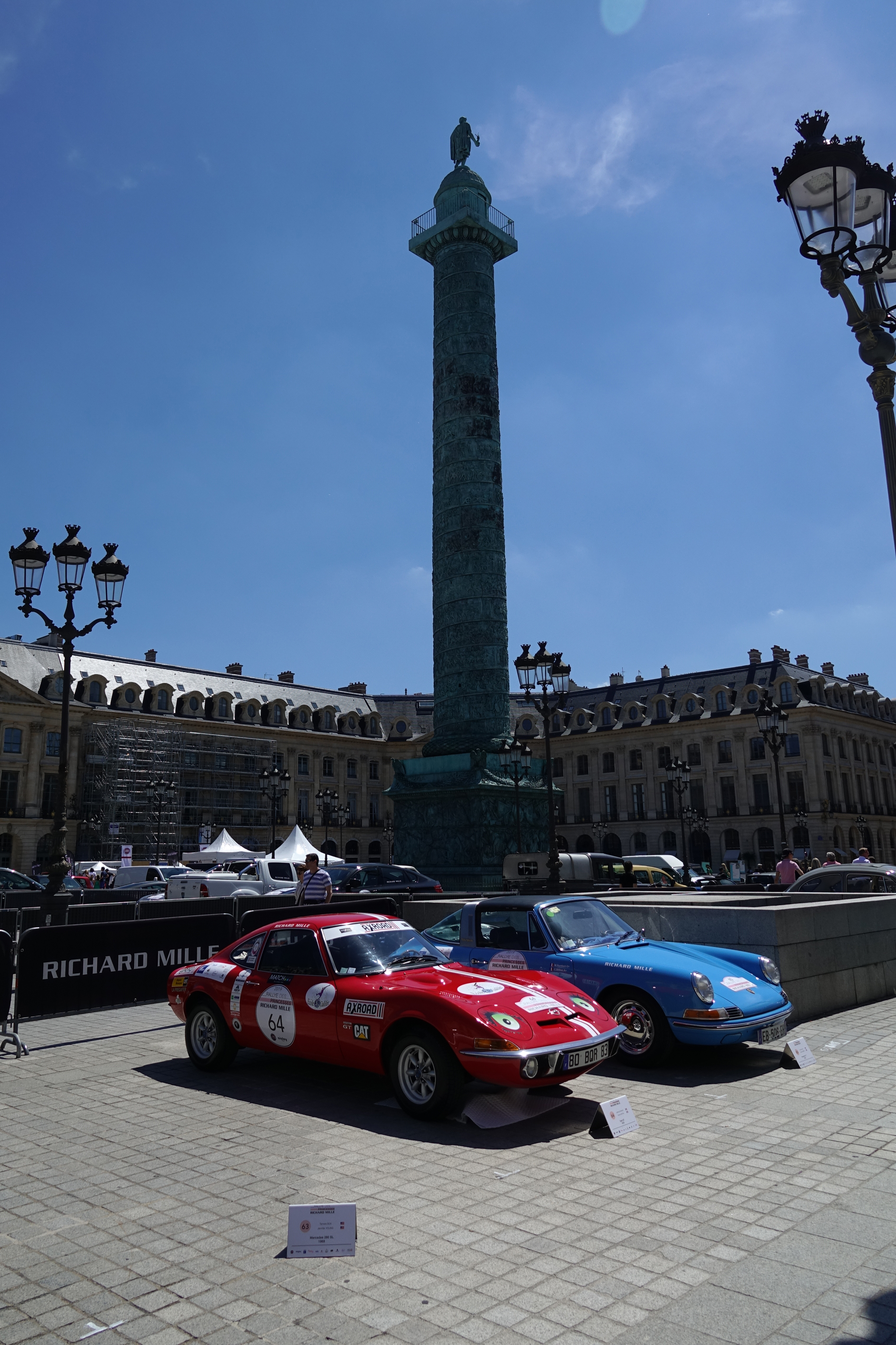 Rallye des Princesses 2019-Place Vendôme-Paris